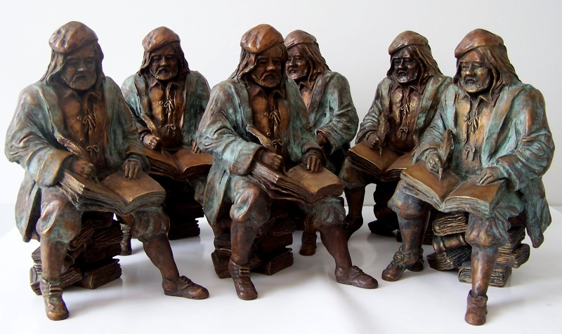 Neocorus-Kleinplastiken